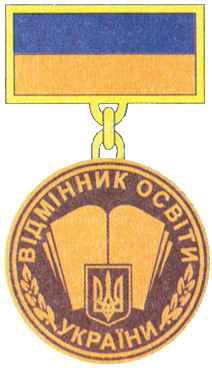 Нагрудний знак «Відмінник освіти України» (відомча заохочувальна відзнака Міністерства освіти і науки України), версія ДО наказу МОН № 1047 від 30.07.2013